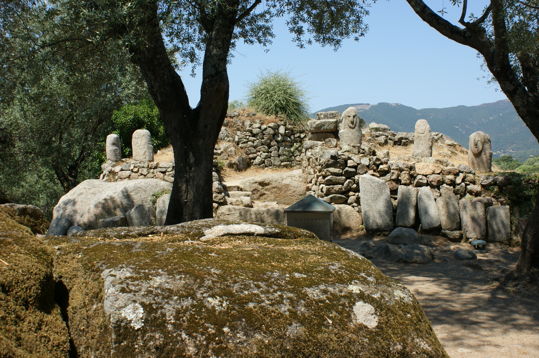 Fortificații cu statui megalitice.